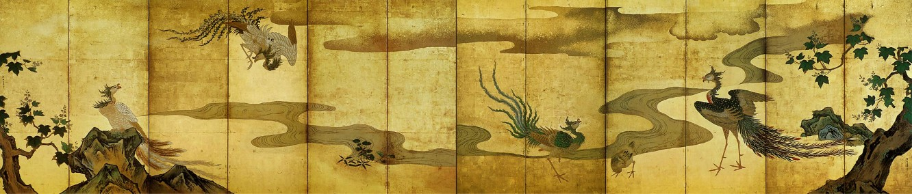 Phoenix et Paulownia du peintre Kanō Tannyū (17e siècle). Chaque 158,2 × 377.6cm. couleur or sur papier.